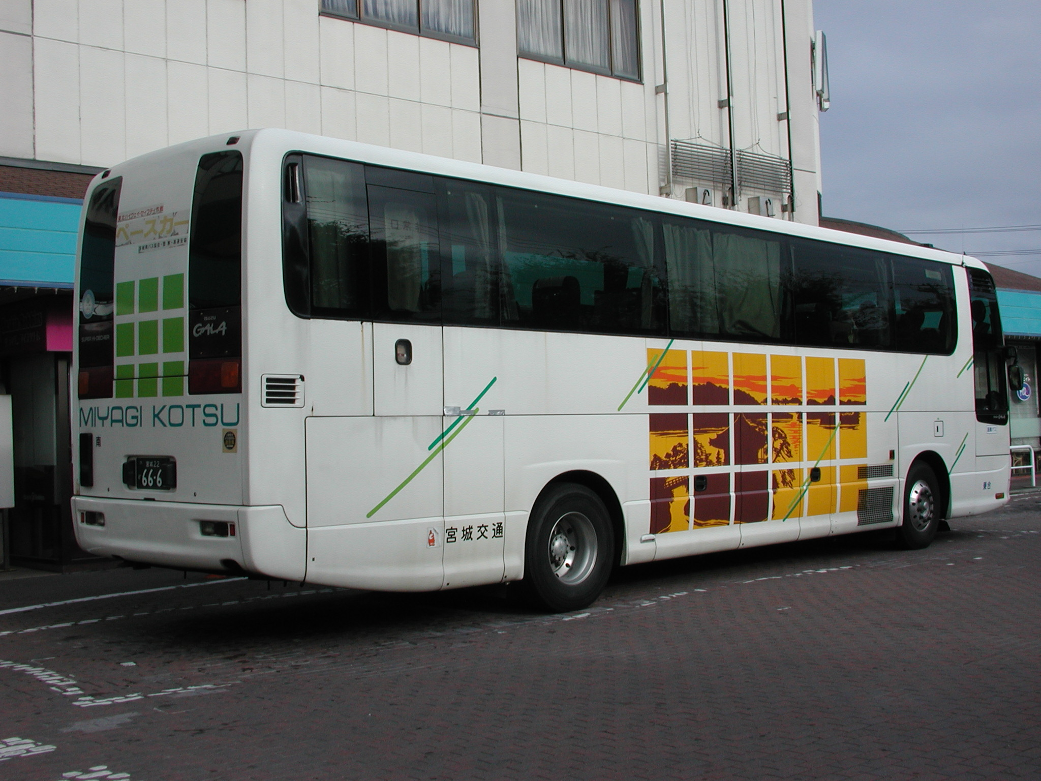 宮城交通：高速路線車両 （いすゞ・ガーラ ・KC-LV782R1/後部）：うみねこ号運用ja:八戸ラピアバスターミナルにて この面は「松島の風景」をイメージにした絵柄だが、その反対の面には「仙台の町並み」をイメージにした絵柄となっている。